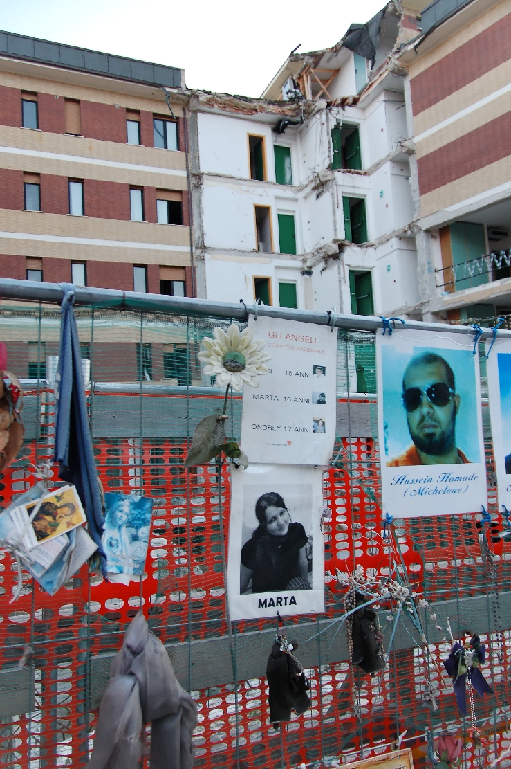 L'Aquila 2011